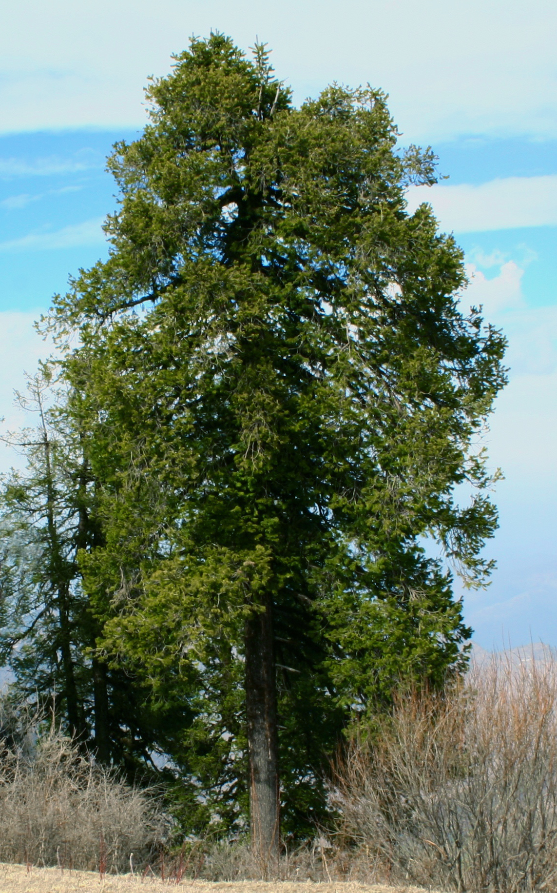 Abies pindrow, Dhanolti, Uttarakhand, India.